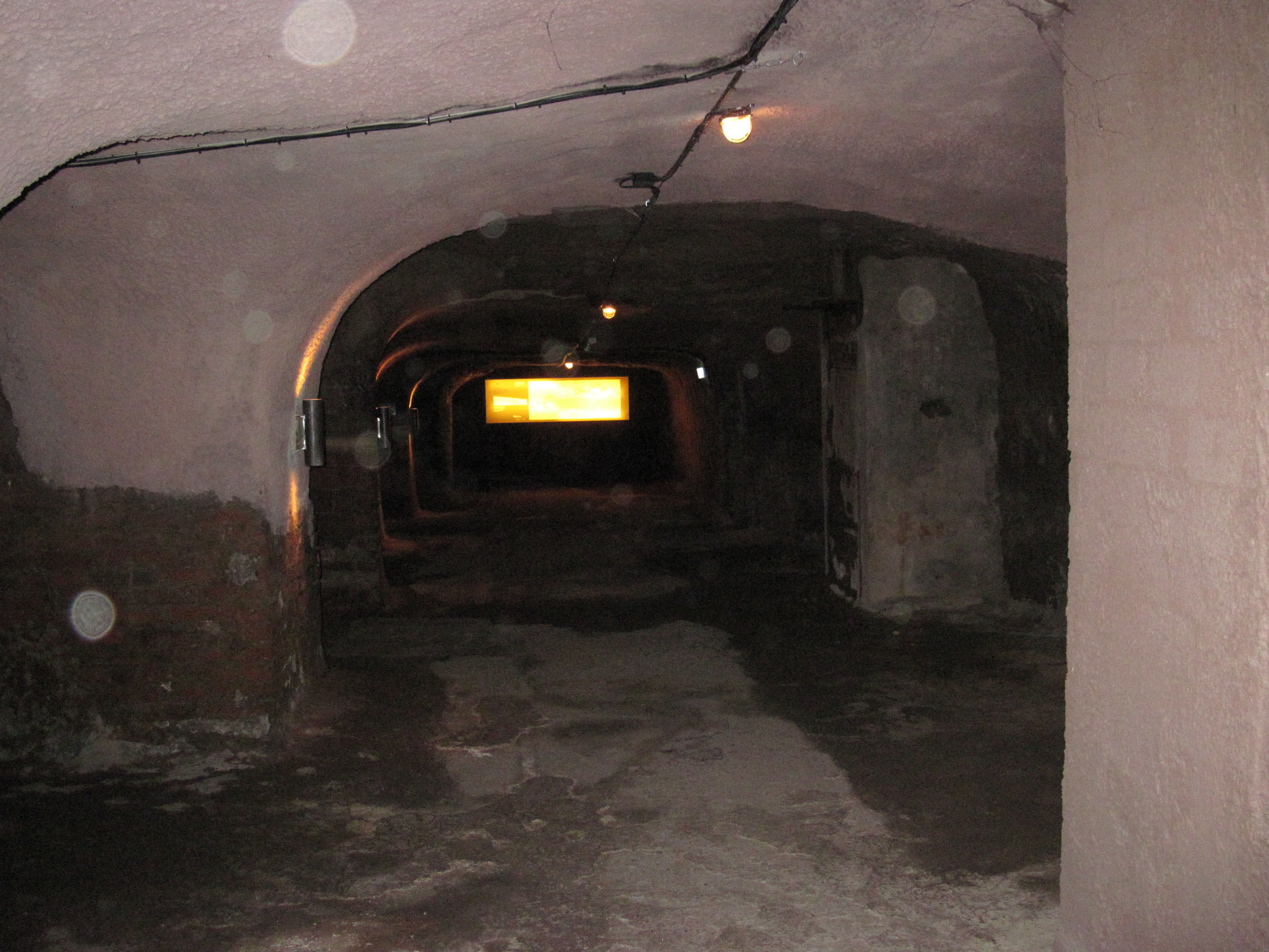 Bierlager